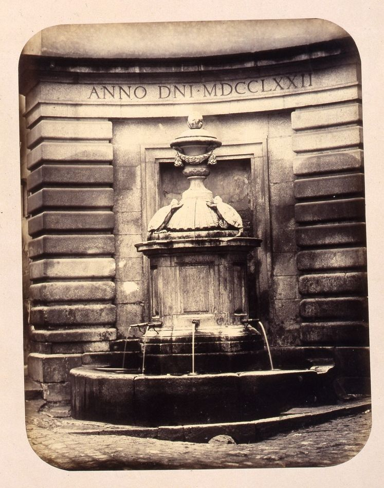 Fuente Galápagos. Calle de Hortaleza, Madrid Obra en 1864 del fotógrafo toledano Alfonso Begué, muerto el 31 de octubre de 1865. Cartulina sepia. Albúmina. 43 x 32 cm. Fotografía contenida en un álbum procedente del Archivo de Villa y trasladado al Museo de Historia en 1983.